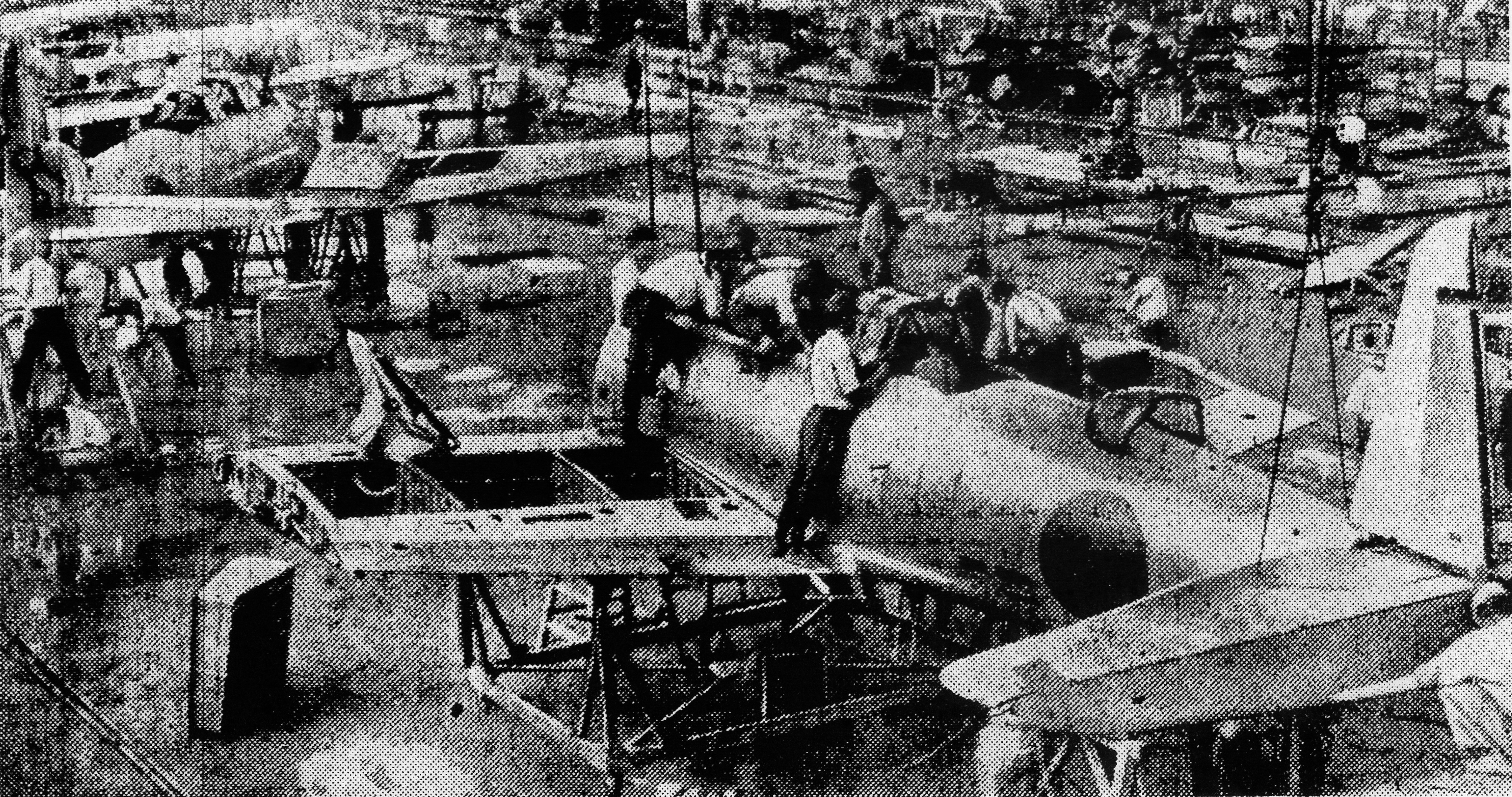 中島飛行機半田製作所本工場での全体組み立て作業